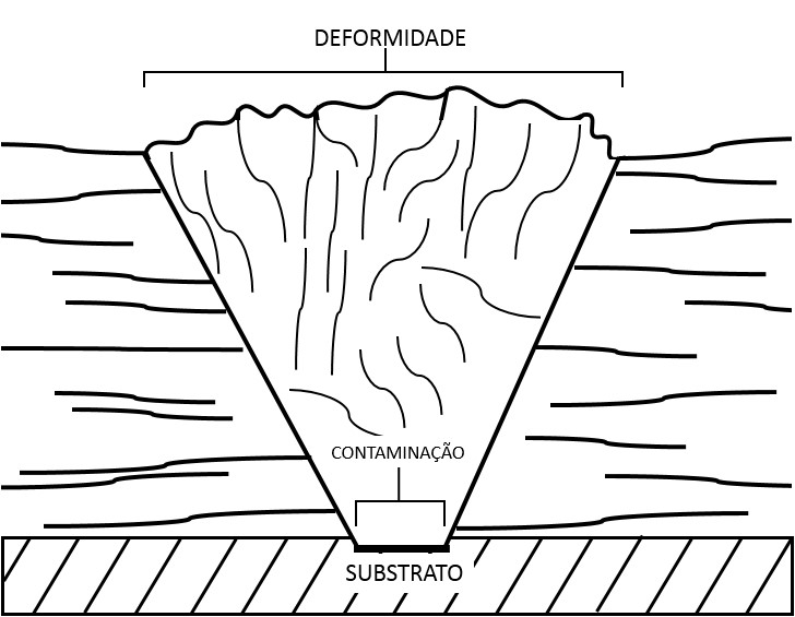 mergulhando o substrato em um agente corrosivo pode ser capaz de remover a superfície defeituosa e revelar os poços e linhas característicos de defeitos residuais